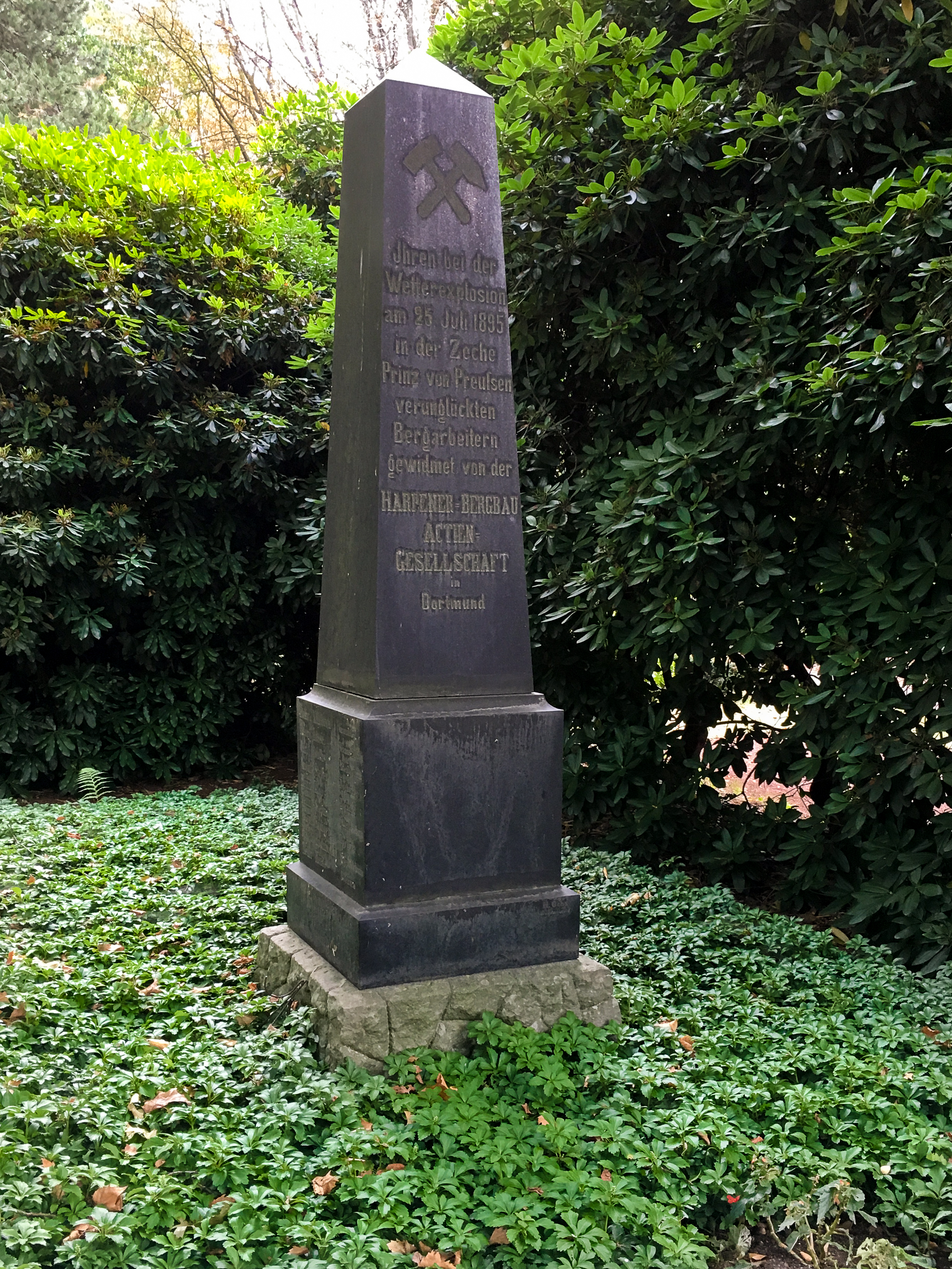 Ehrenmal für die Toten der Schlagwetterexplosion auf der Zeche Prinz von Preußen 1895.This is a photograph of an architectural monument., no. A 289